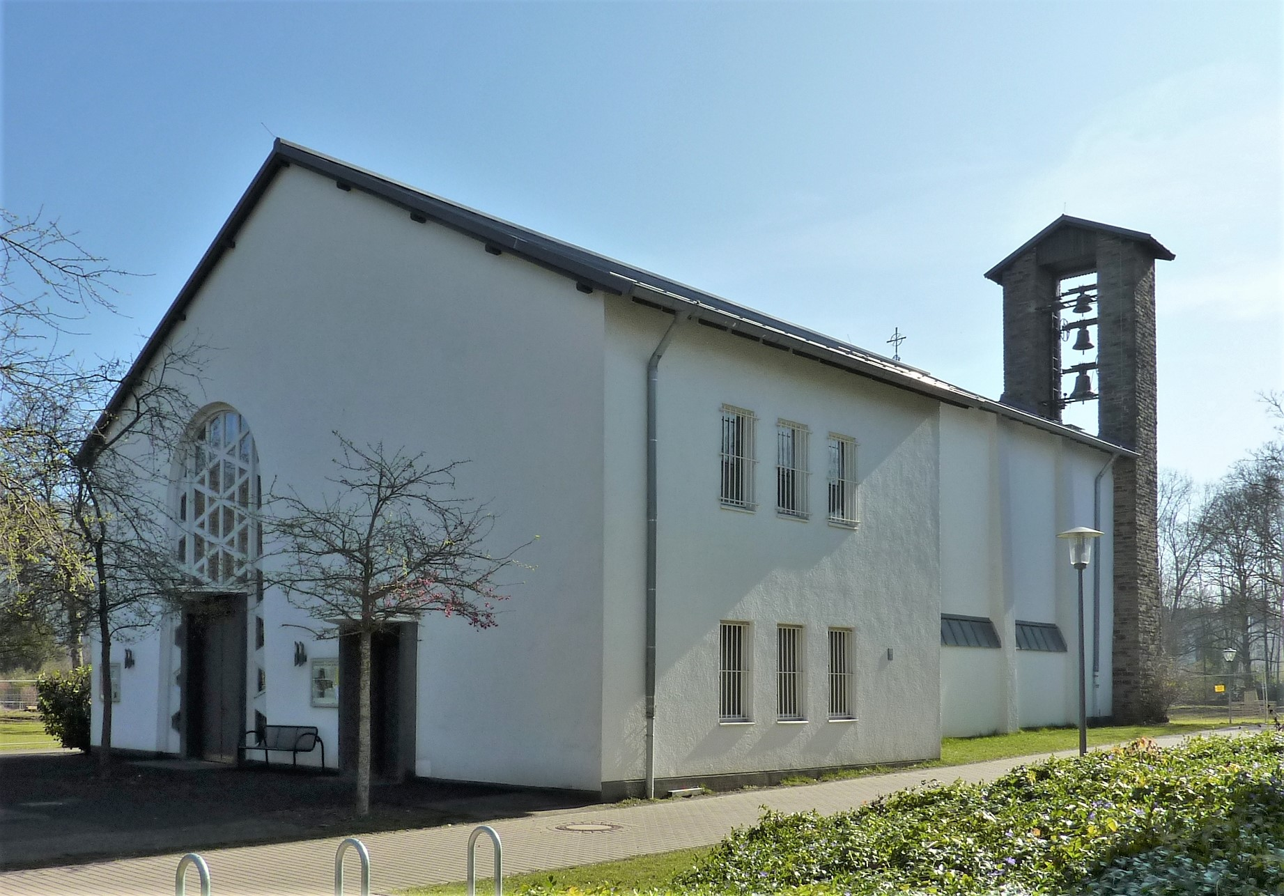 St. Anna, Köln-Riehl